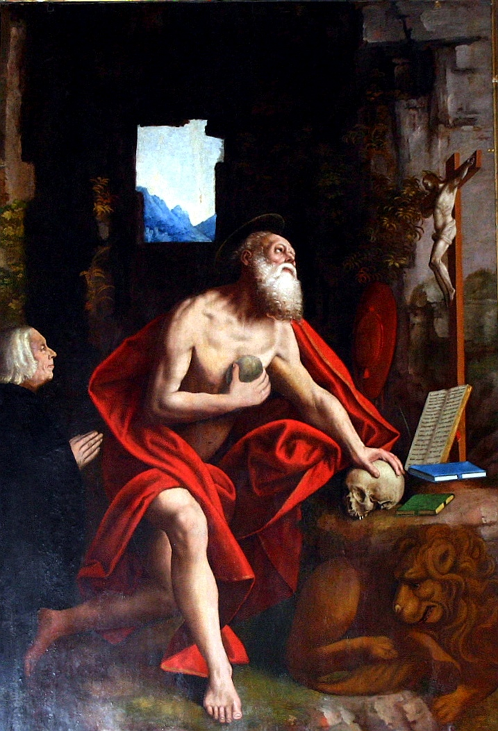 Gaudenzio Ferrari, St Jerome 1545, San Giorgio al Palazzo church, Milan, Italy